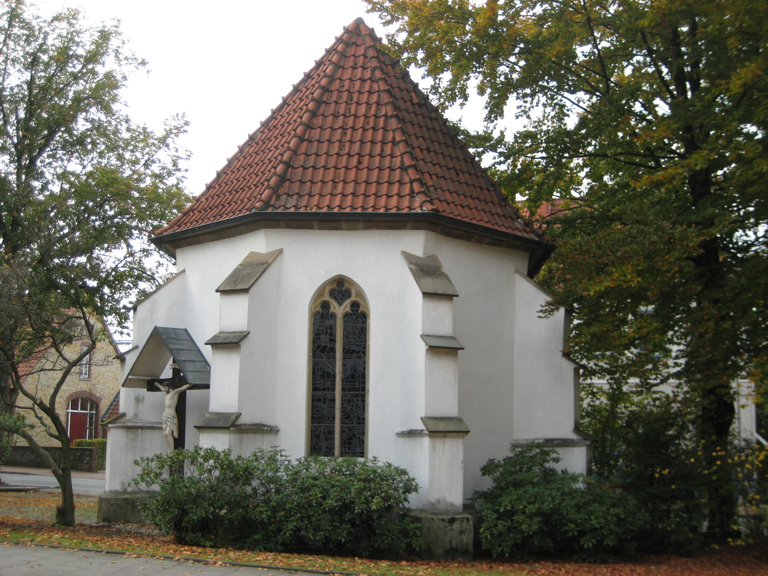 Die gotische Annakapelle in Wallenhorst am Bokholt, dem Versammlungsplatz der Stiftsstände im 15. und 16. Jahrhundert